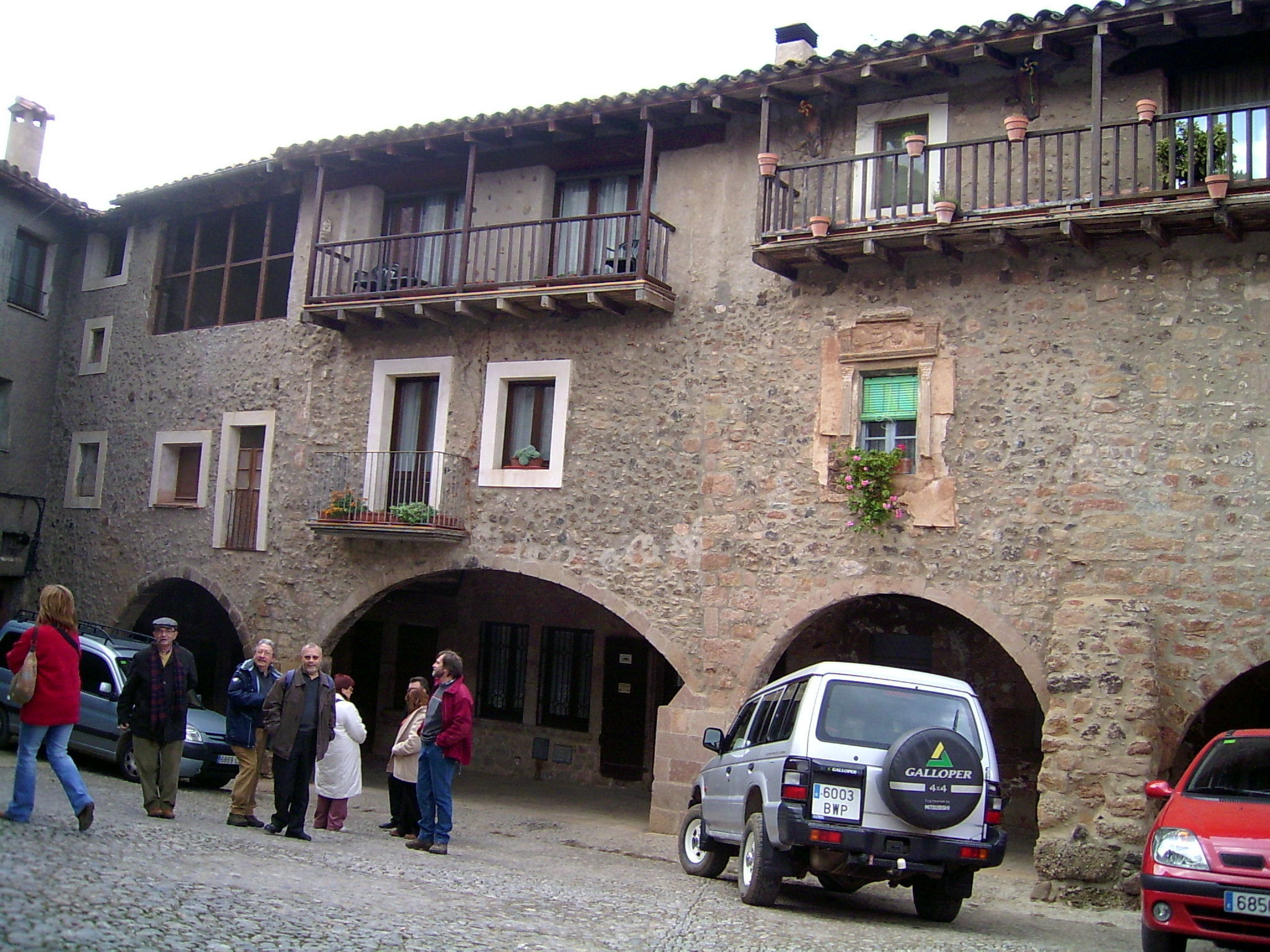 Vista de la plaça porticada de Santa Pau, a la comarca de la Garrotxa, (Catalunya).